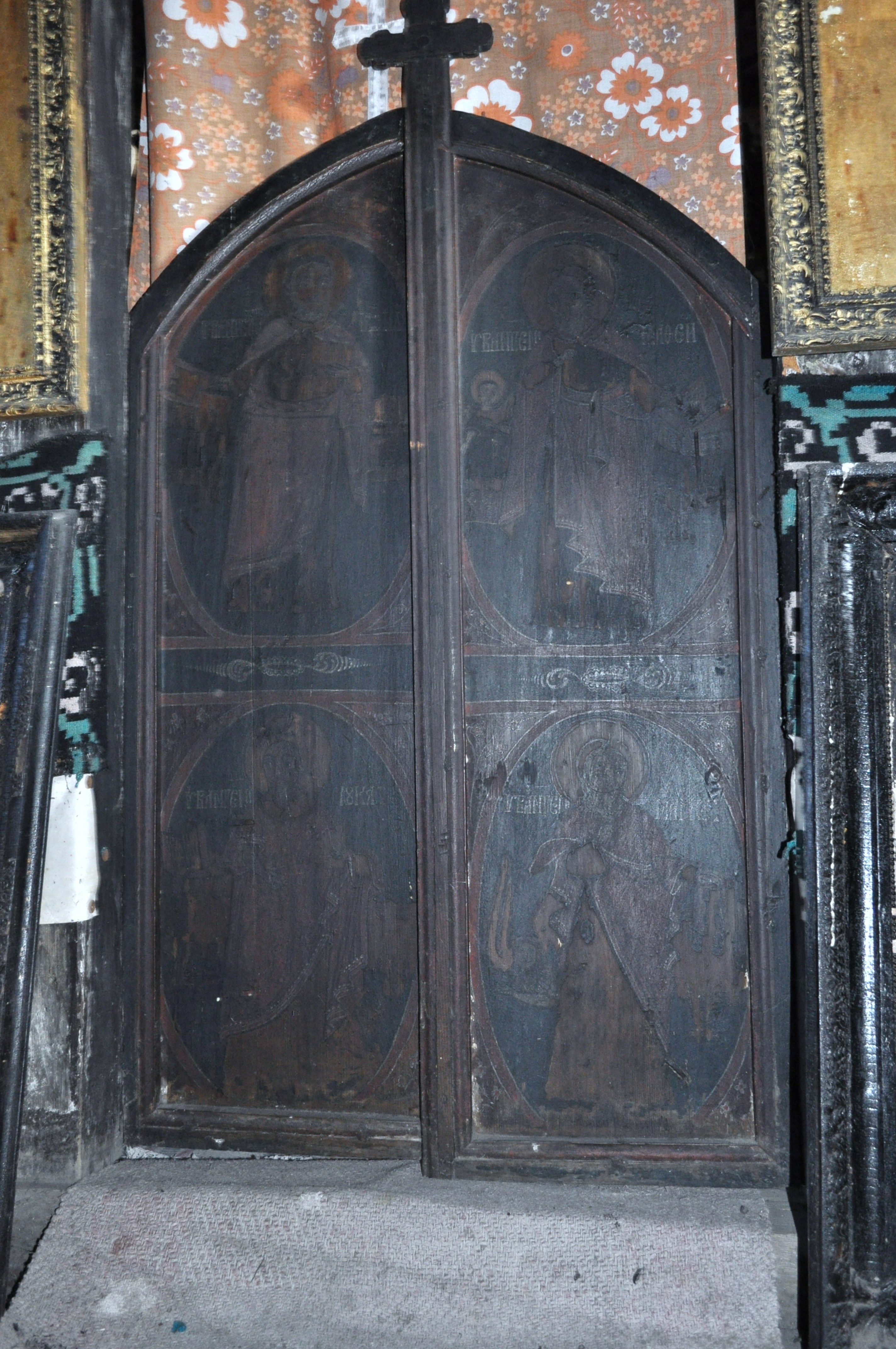 Biserica de lemn "Sf. Arhangheli", sat NOŞLAC, județul Alba